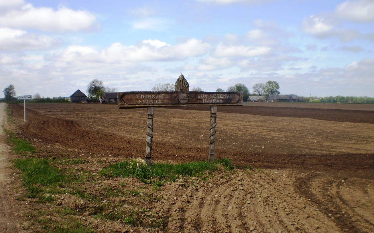 Juozo Urbšio tėvonija, Šatenių ir Gineitų kaimų riba, Kėdainių raj.